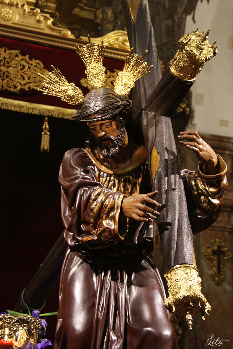 Fotografía propia realizada por Manuel Francisco Álvarez Ruiz.